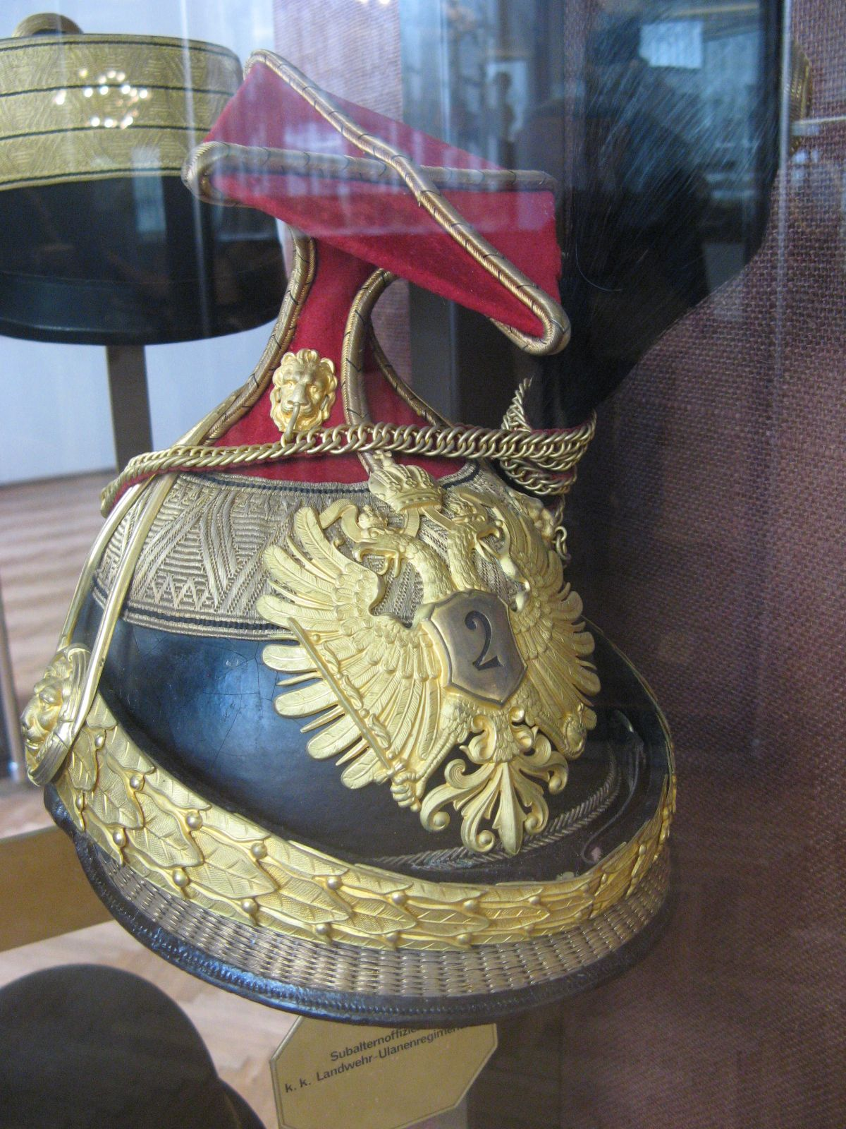 Tschapka für Subalternoffiziere eines k.k. Ulanenregiments